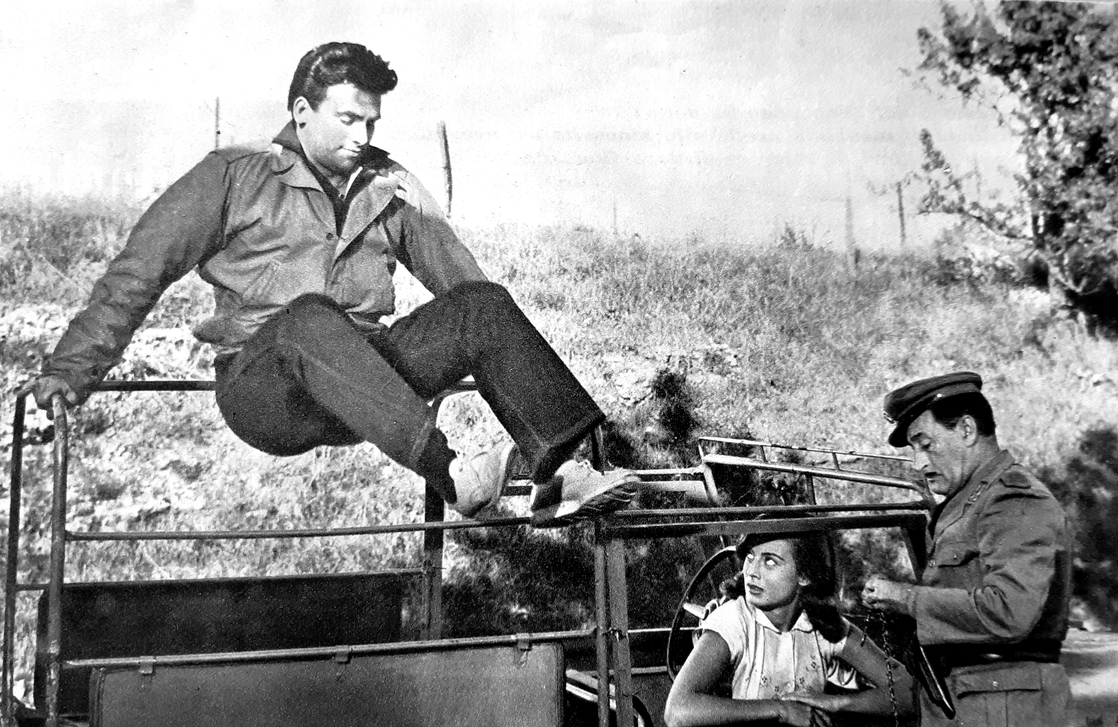 Fotogramma del film italiano Totò e Carolina, regia di Mario Monicelli, produzione Rosa Film (De Laurentiis), Roma, 1955. Immagine con Maurizio Arena, Anna Maria Ferrero e Totò